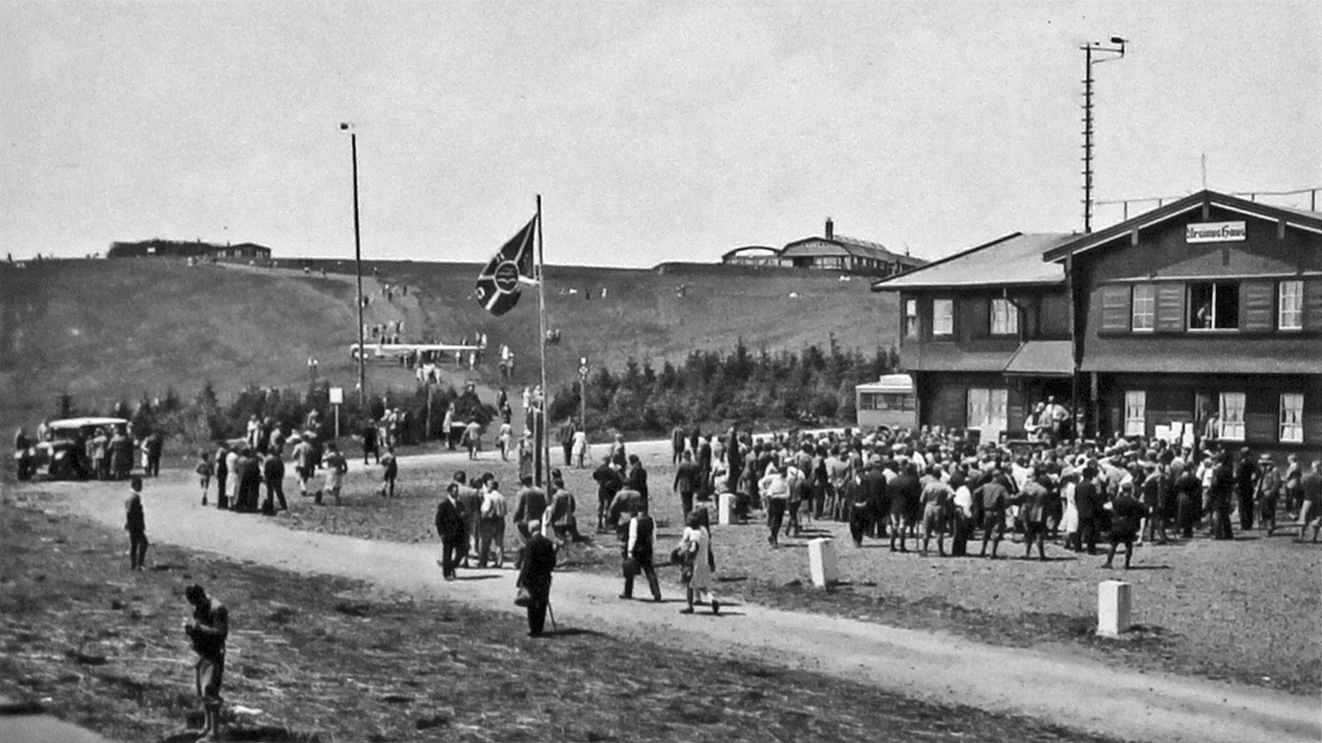 Das Ursinus-Haus auf der Wasserkuppe. Die Rhön-Rossitten-Gesellschaft (RRG) errichtete 1925 auf dem Fundament der der Messerschmitt-Flugschule ein Gebäude in dem die Abteilungen Flugtechnik und Aerodynamik des Forschungsinstituts der RRG, die Leitung und Organisation der Rhönwettbewerbe und eine Wetterwarte des Preußischen Meteorologischen Dienstes untergebracht wurden. Das Gebäude erhielt seinen Namen zu Ehren des Mitbegründers der Rhönsegelflugwettbewerbe, Oskar Ursinus.